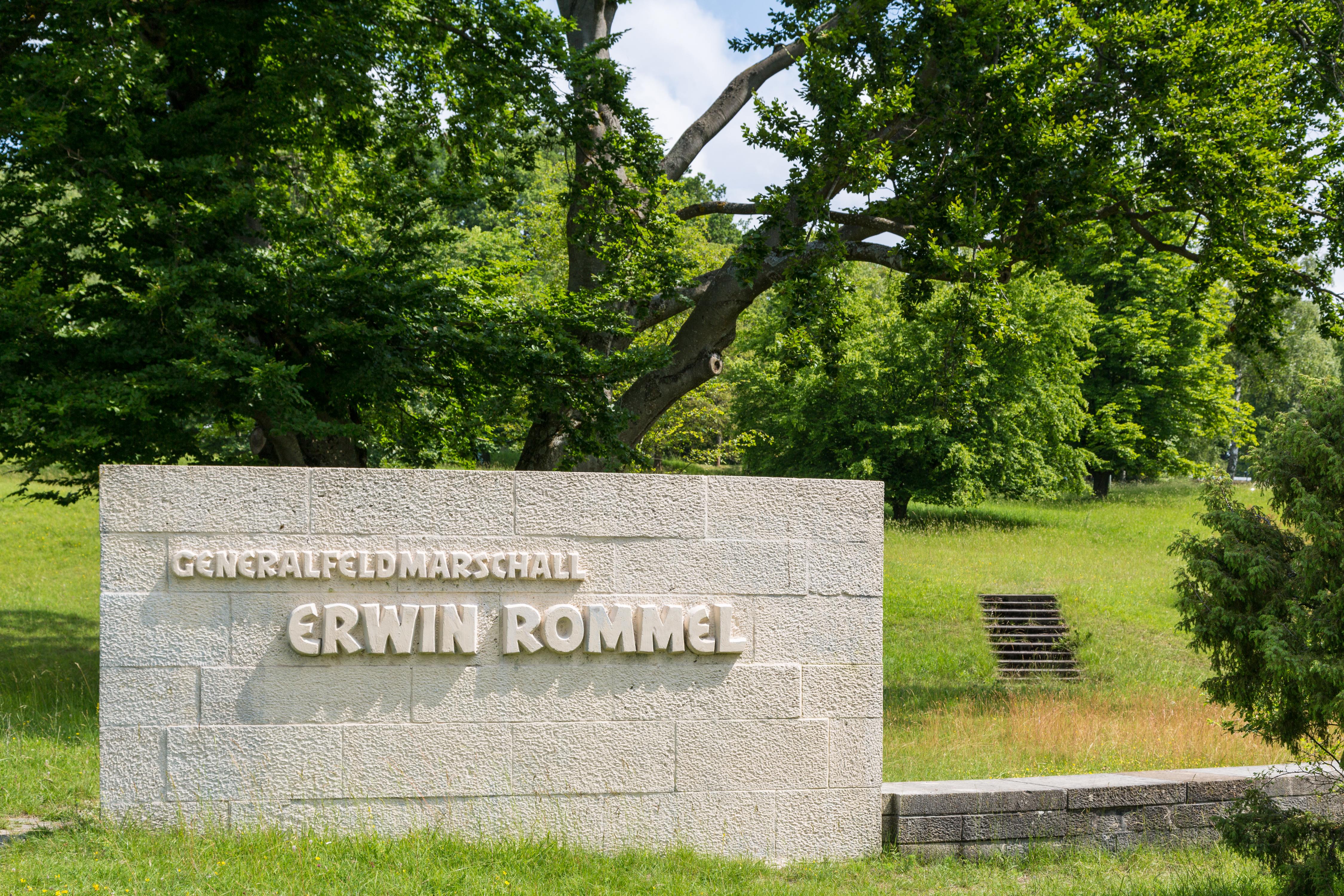 Generalfeldmarschall-Rommel-Denkmal in Heidenheim (Brenz)